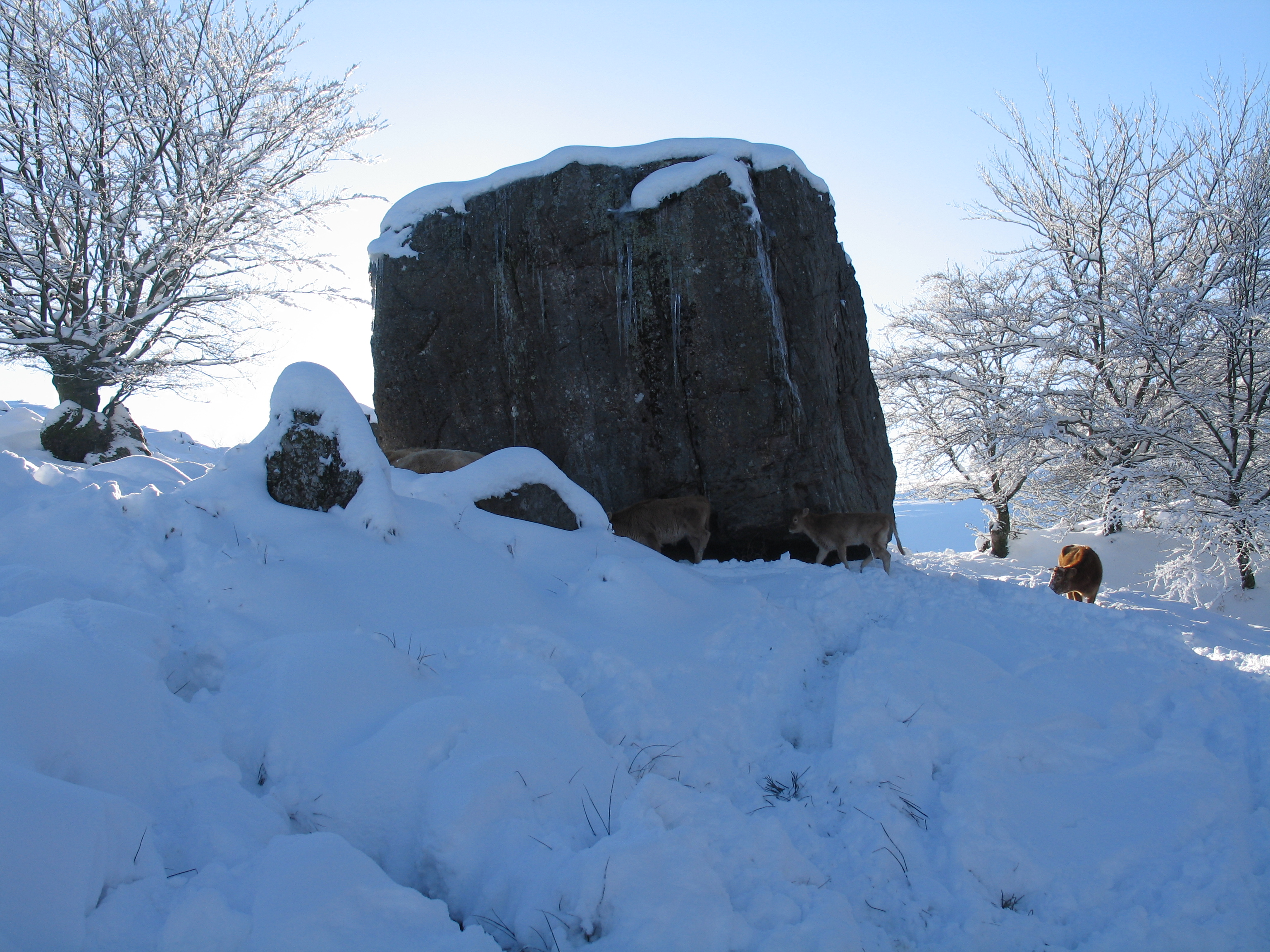 Betizu txahal harpe baten sarreran